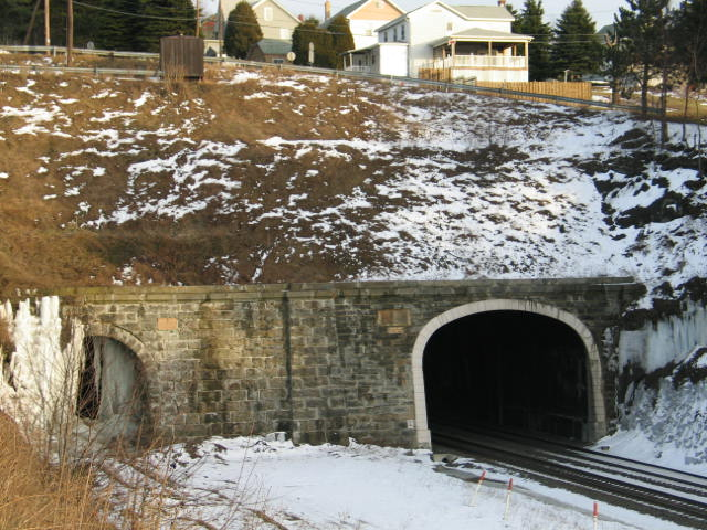 Gallitzin Tunnels